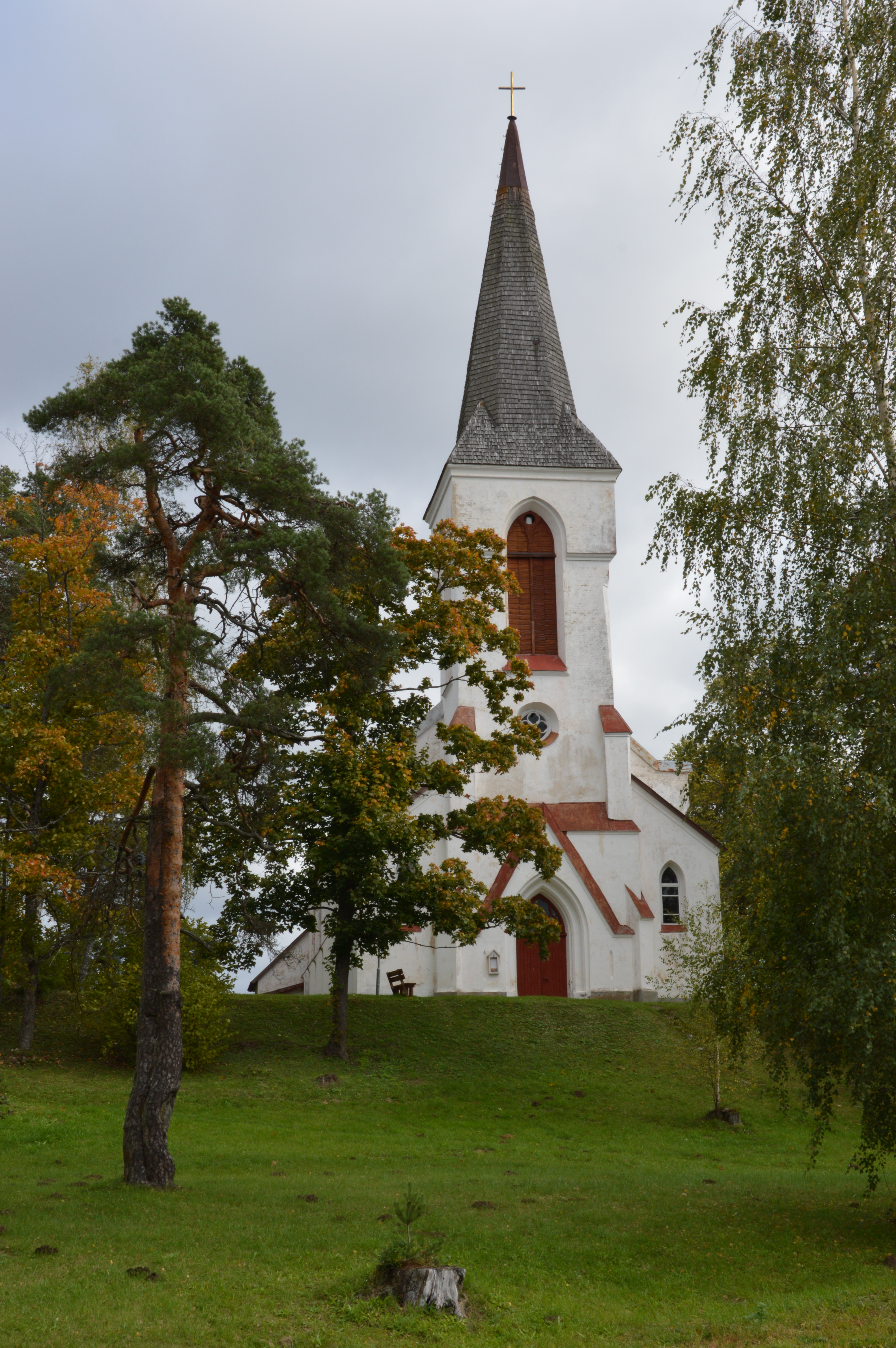 Iisaku kirik